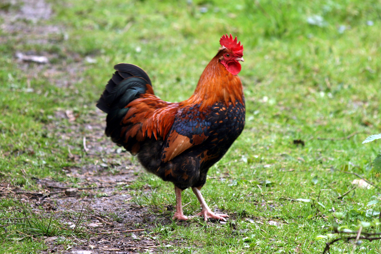 Coq